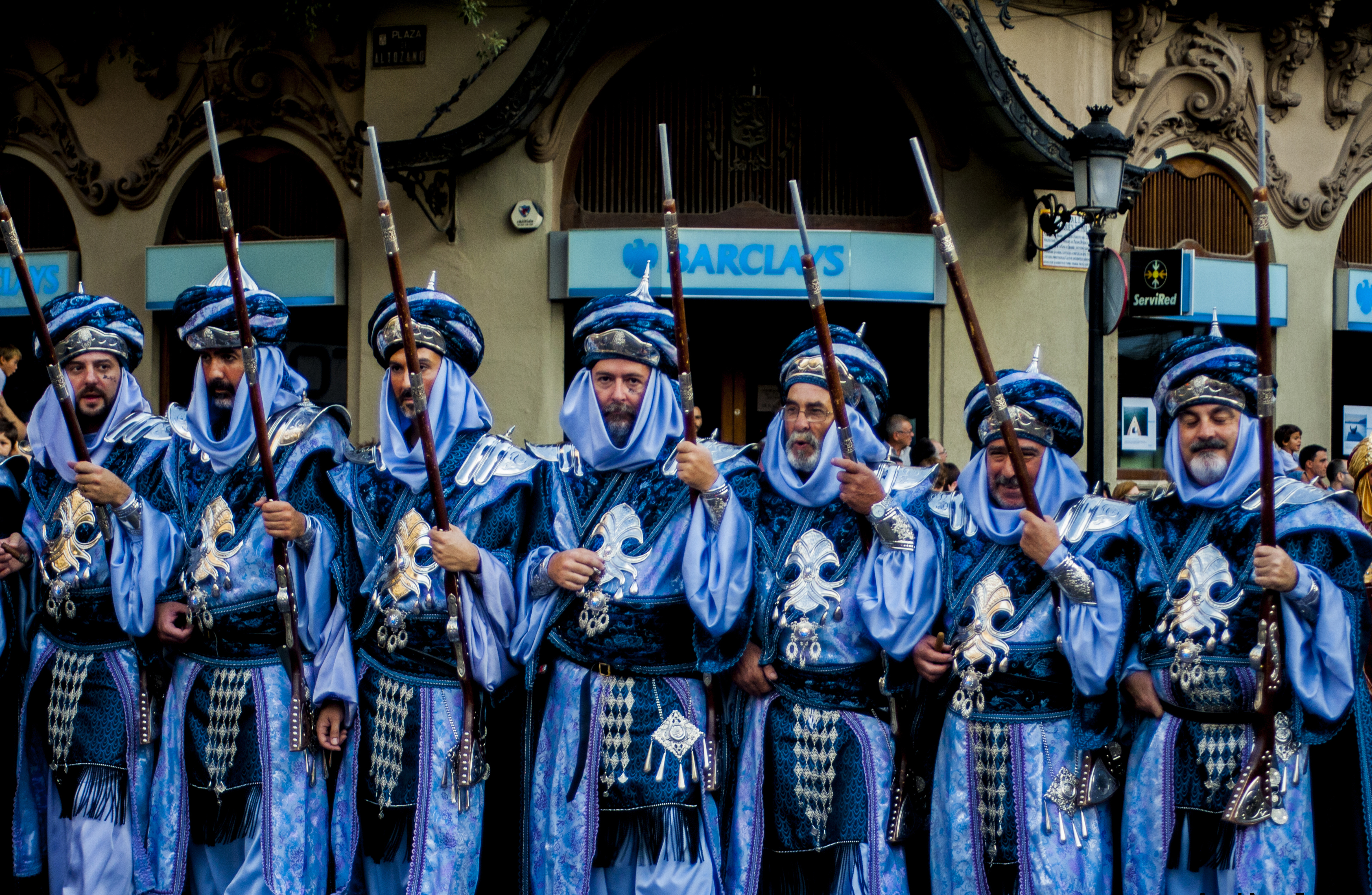 Desfile de Moros en la Cabalgata de la Feria de Albacete 2012